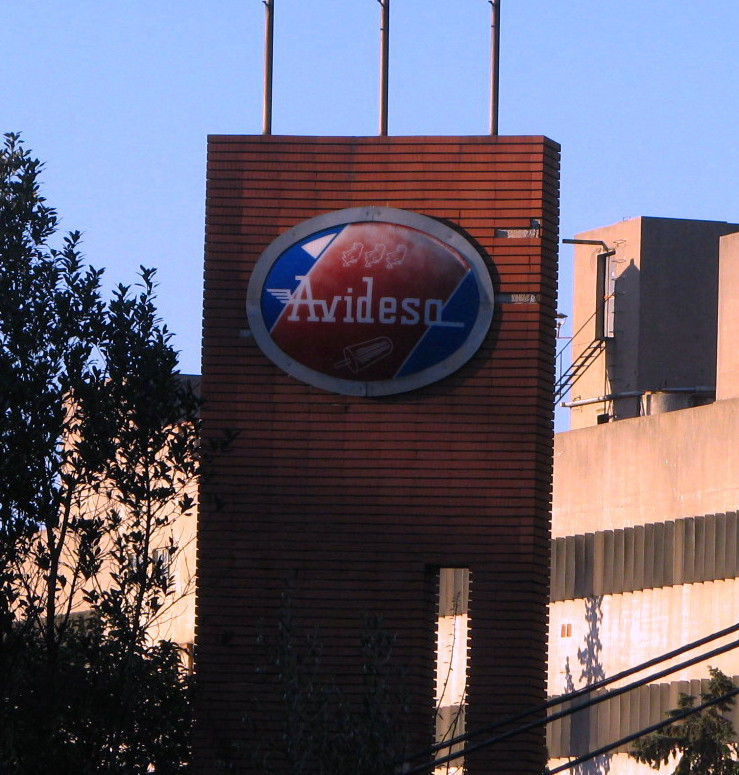 Emblema de Avidesa en una de las antiguas factorias de Alzira (España).